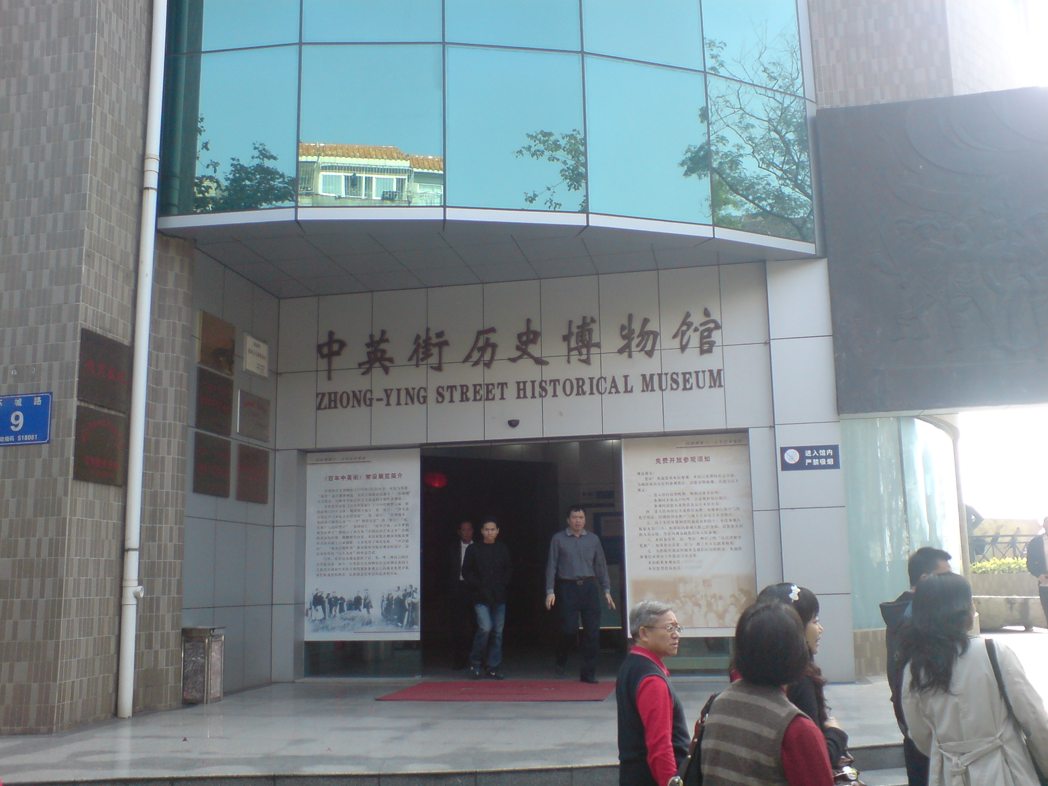 中文（中国大陆）: 中英街历史博物馆